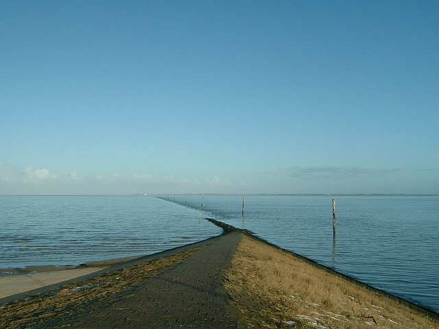 Fährstraße nach Baltrum von Nessmersiel aus , Die Stangen markieren den Weg für die Fähre im Watt, im Hintergrund unter den Wolken ist Baltrum zu erkennen.